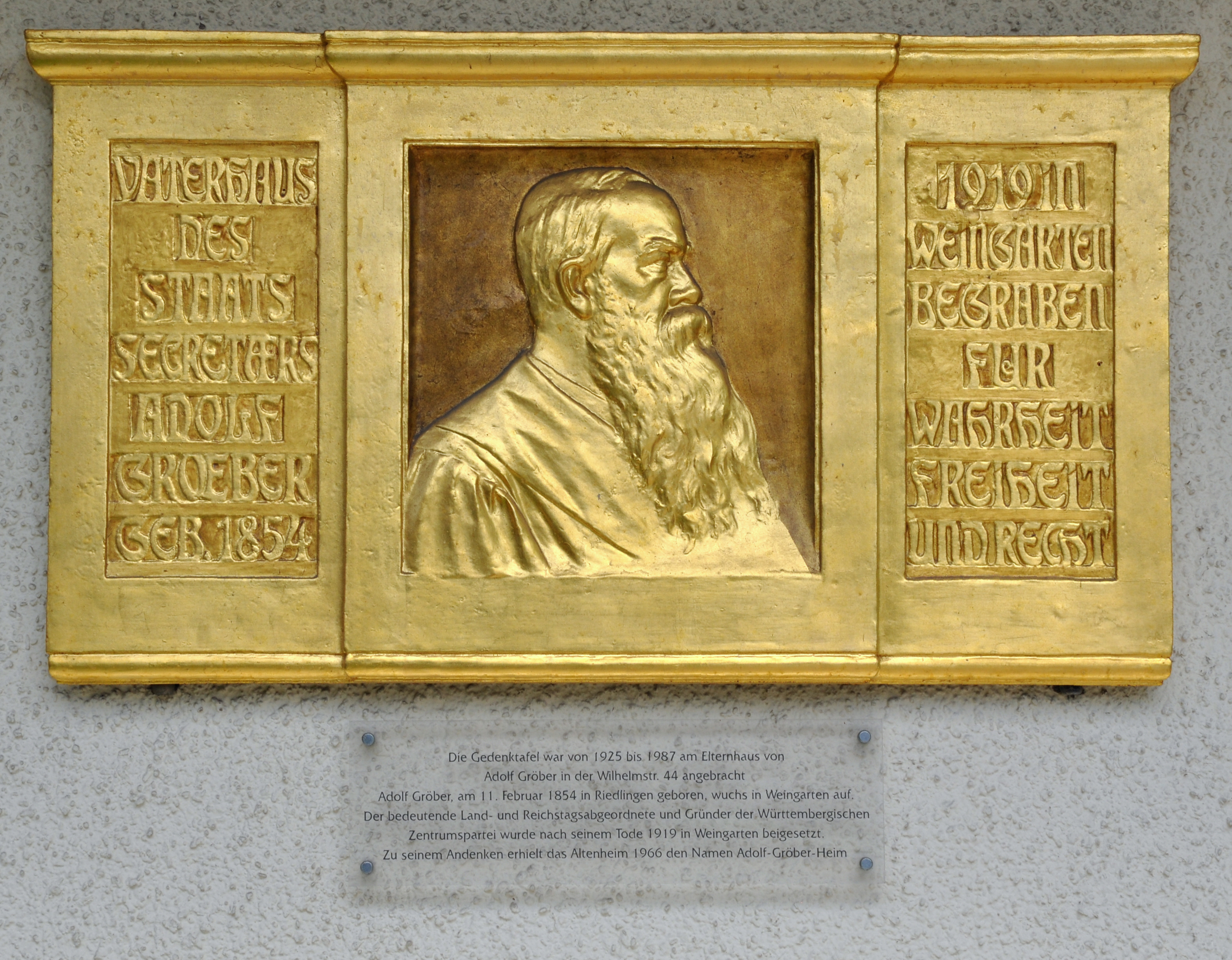 Weingarten (Württemberg), Adolf-Gröber-Heim (Altenheim), Gedenktafel für Adolf Gröber in der Nähe des Eingangs an der Burachstraße, ursprünglich an dessen Elternhaus in der Wilhelmstraße angebracht